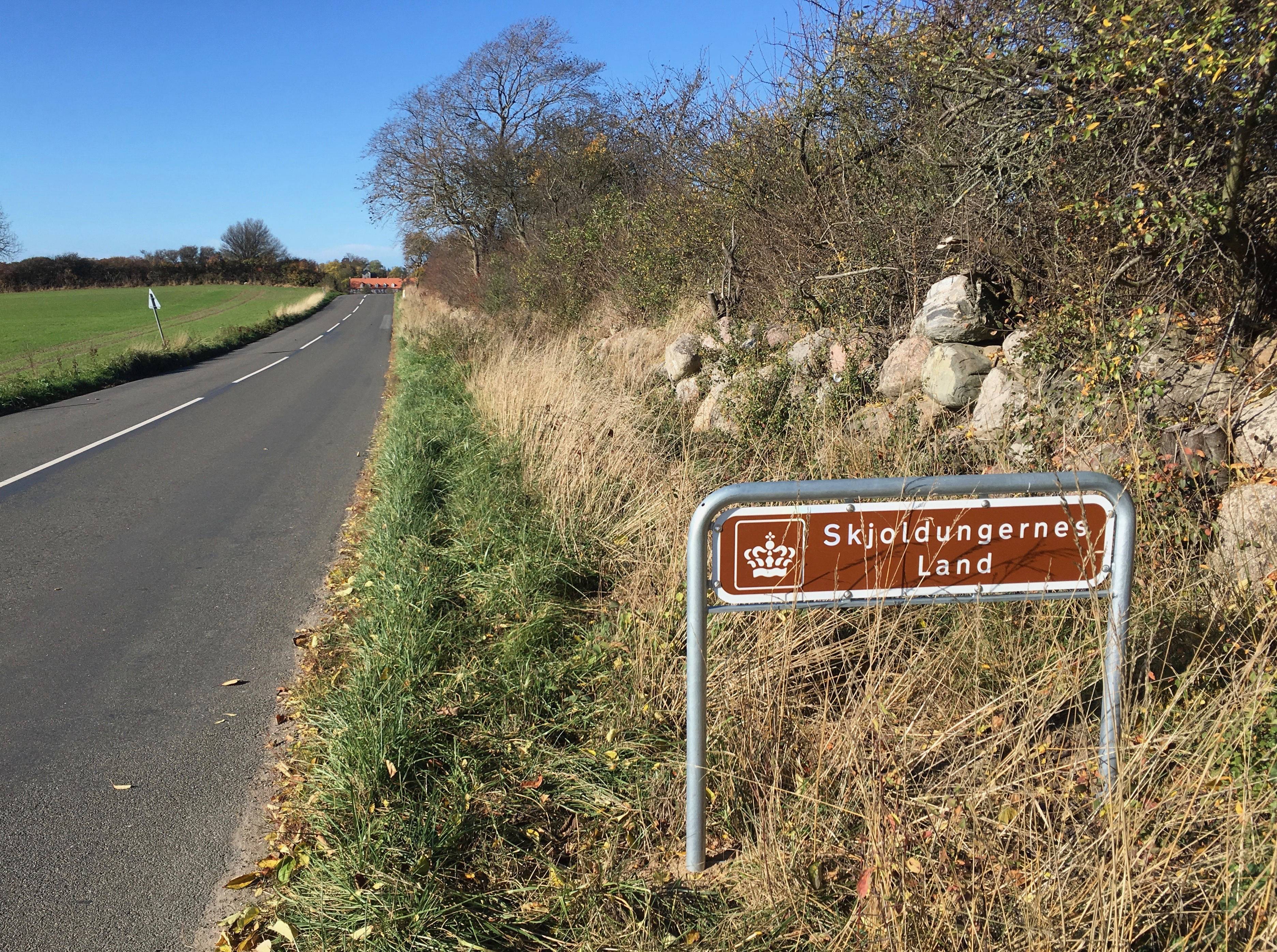 Skilt til Skjoldungernes Land ved Selsø Slot, Hornsherred, Sjælland